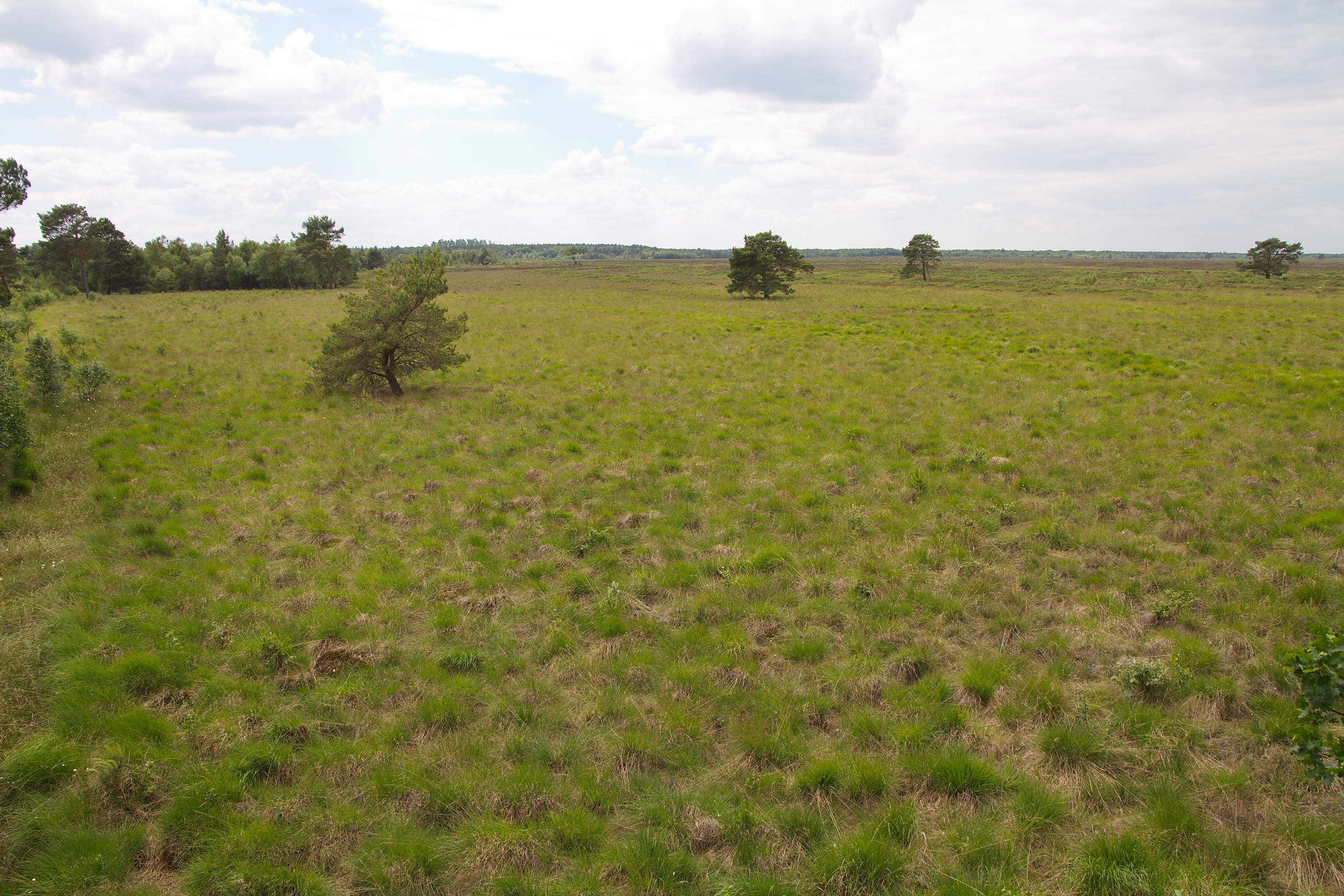 Bissendorfer Moor bei Wiechendorf (Wedemark), Niedersachsen, Deutschland.